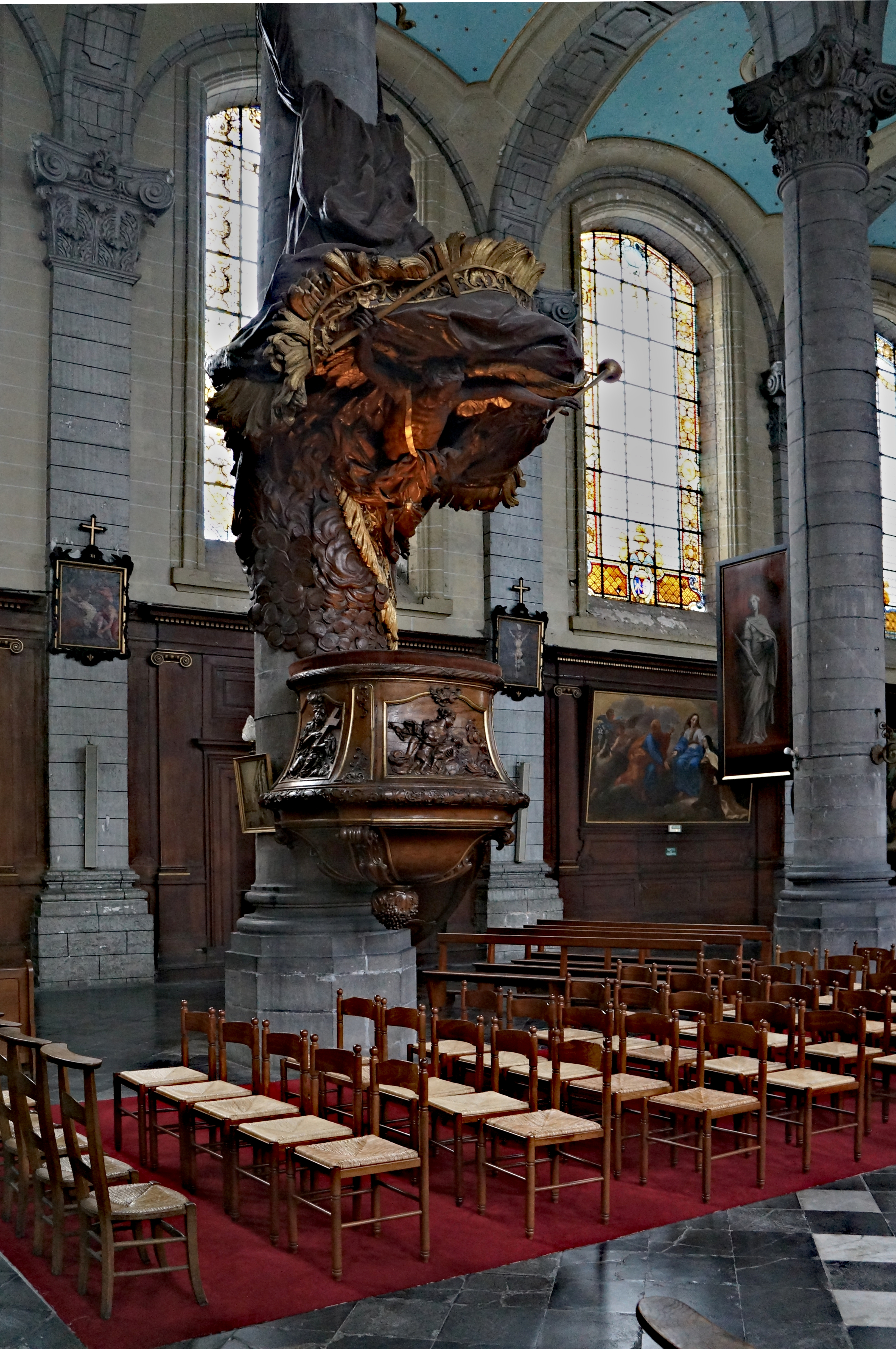 Lille (Nord, Hauts-de- France), église Saint-André, chaire à prêcher de 1768 par Jean-Baptiste Joseph Danezan.